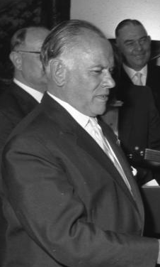 Empfang und Ordensverleihung an Bundestagsabgeordnete durch Bundestagspräsident Dr. Gerstenmaier Bonn Gerstenmaier cropped